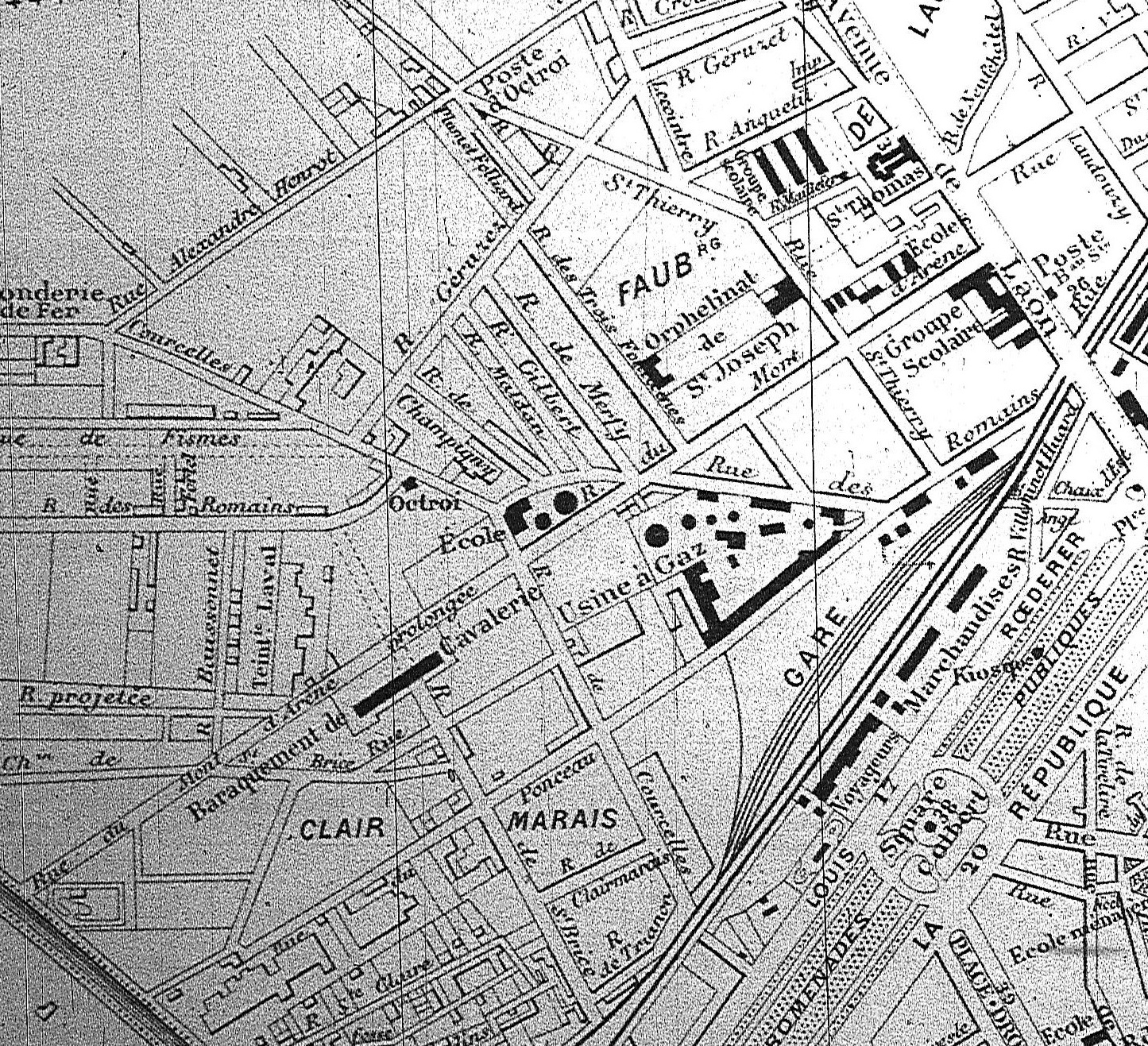 carte ancienne de Reims. côte BM Reims xxxii iii u.